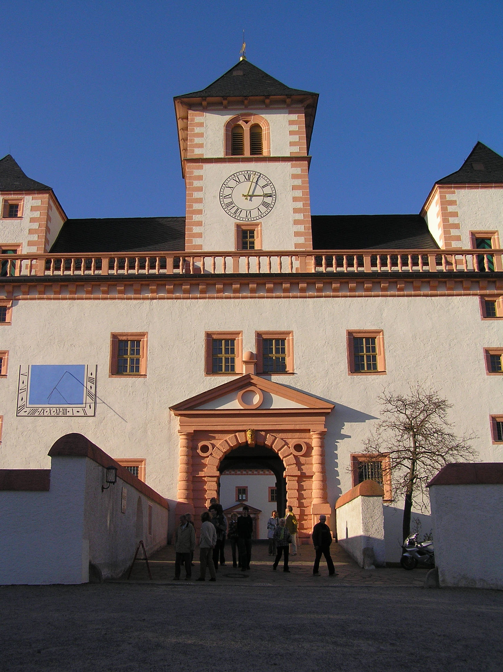 Südtor Augustusburg